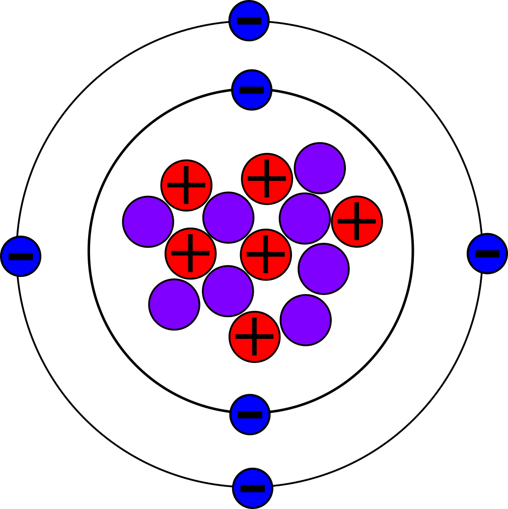 中文（台灣）: 藍色填充黑框圓圈，中間有負號：電子、紅色填充黑框圓圈，中間有正號：質子、紫色填充黑框圓圈，黑框無底大圓圈：簡易電子軌道